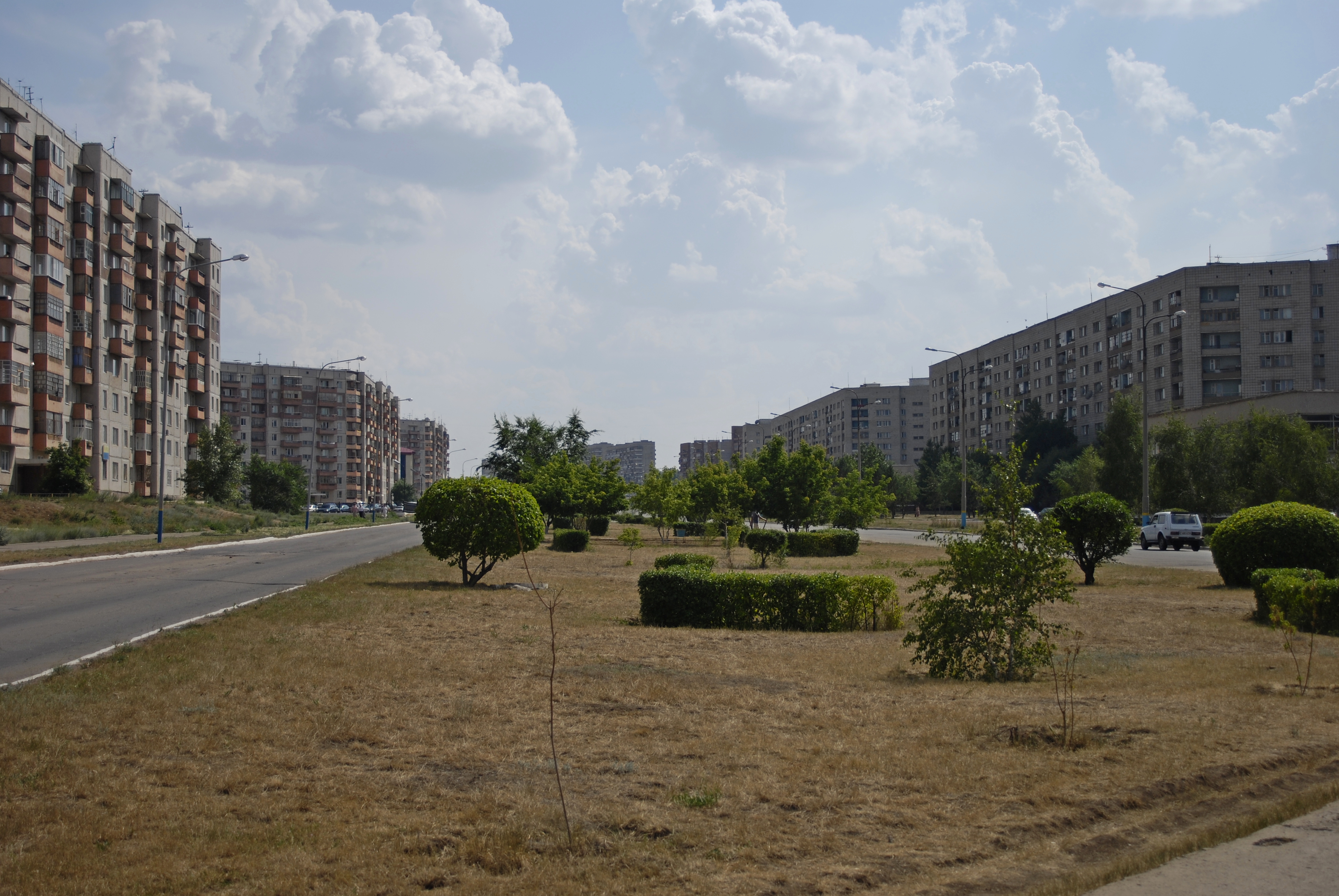 Лунный проспект